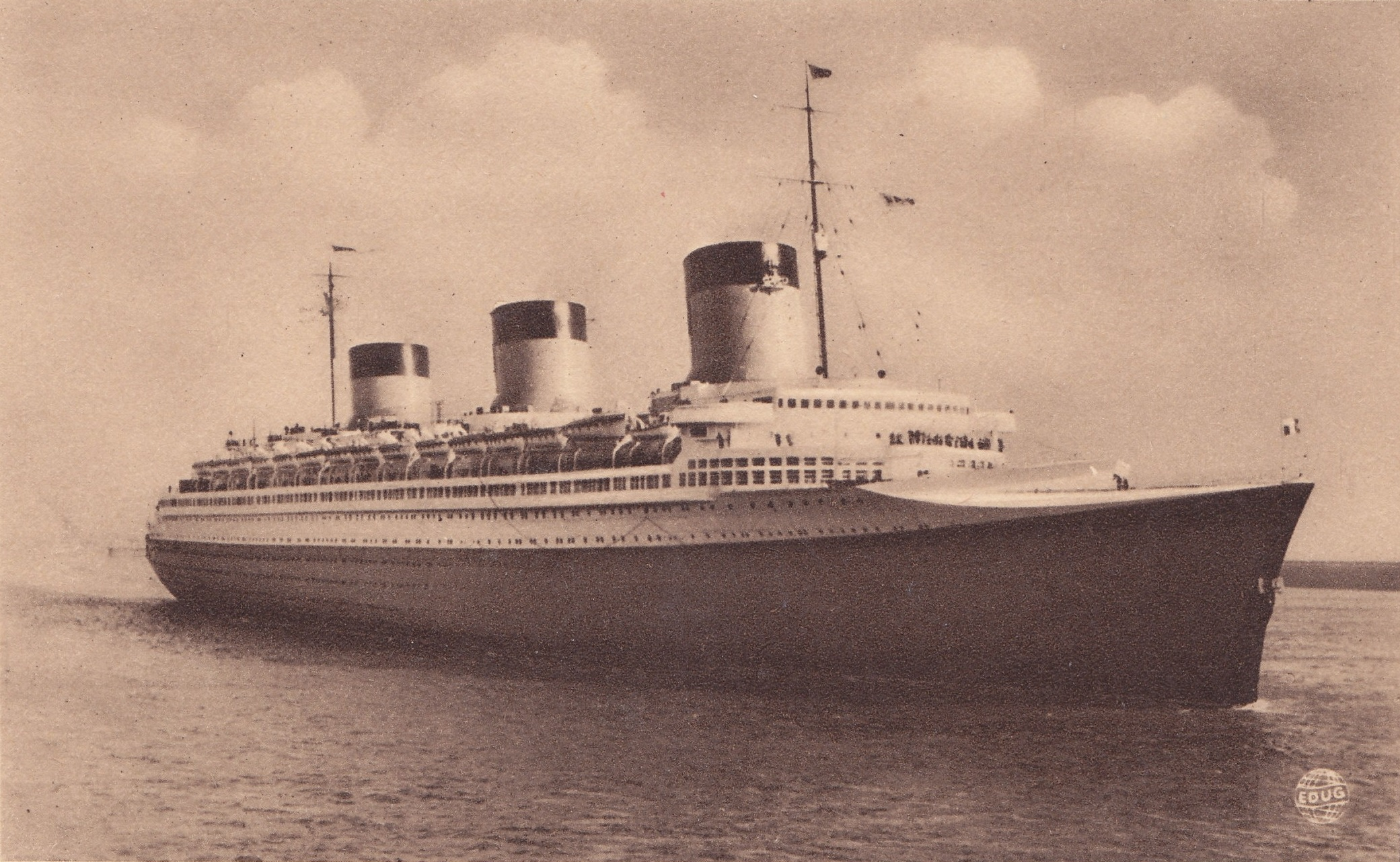 Le Havre, Normandia, França, Arquivo de Villa Maria, ilha Terceira, Açores